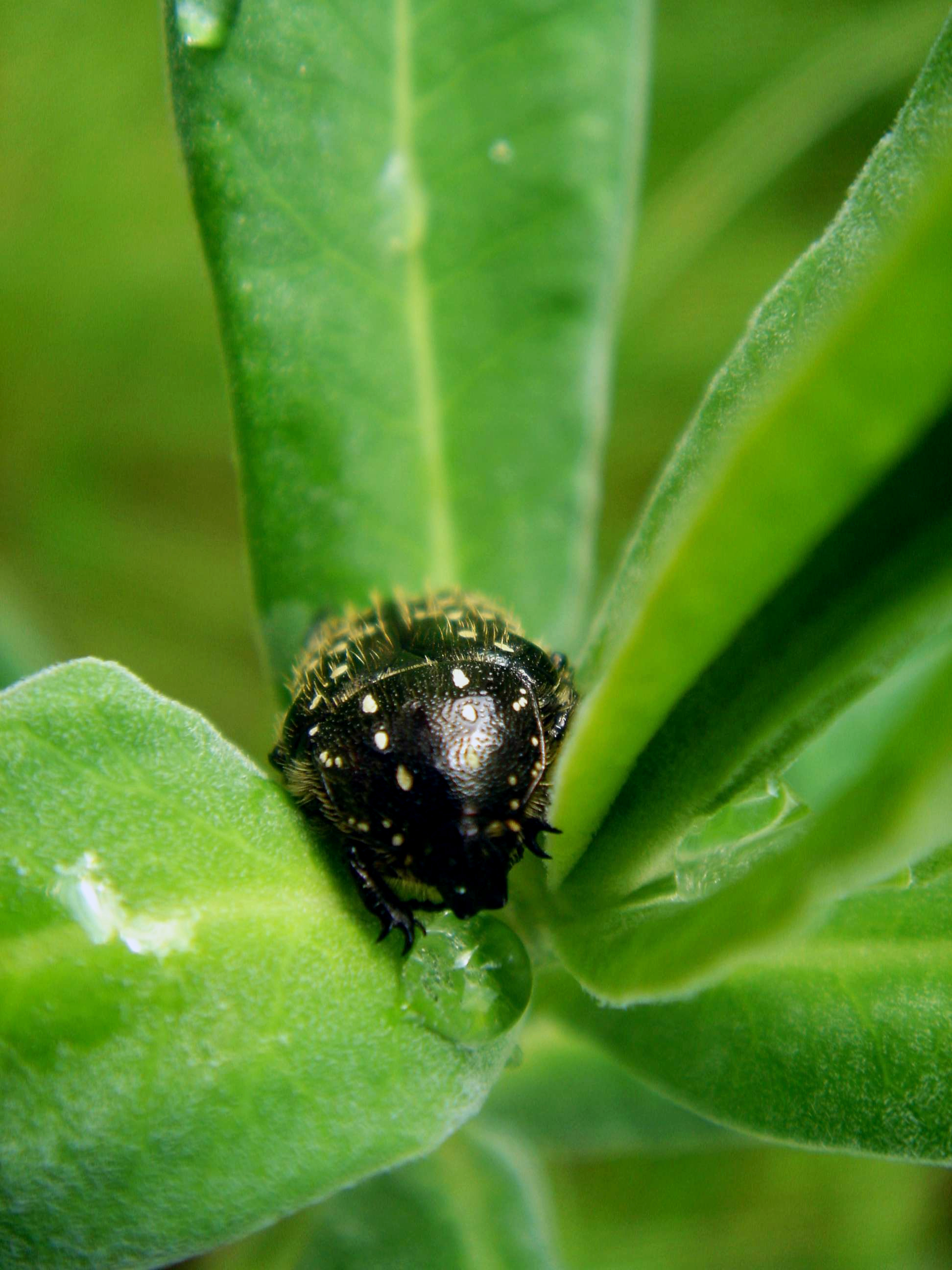 Sokpettyes virágbogár harmatcseppből iszik (Kovászna megye, Erdély)